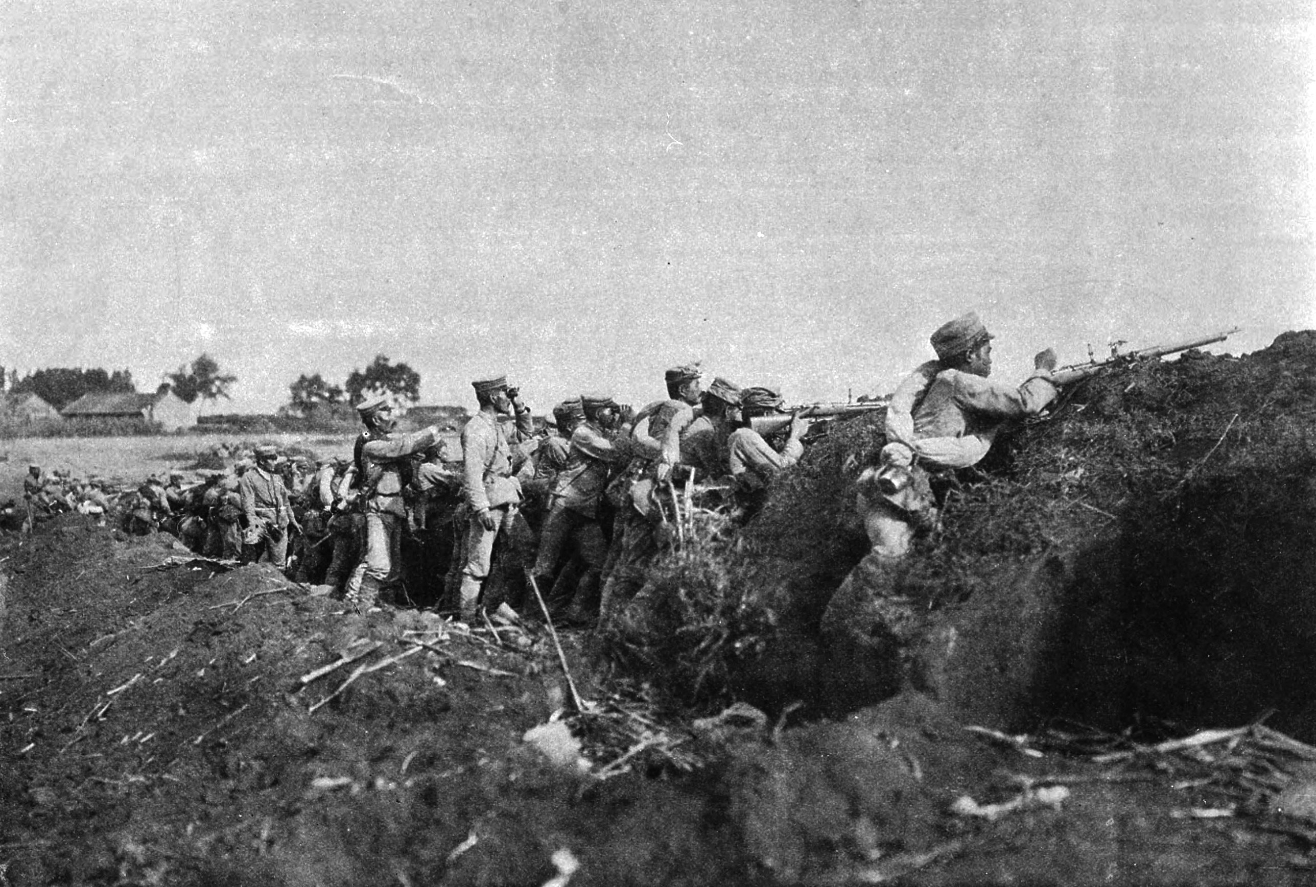 日露戦争において戦闘中の歩兵第8連隊